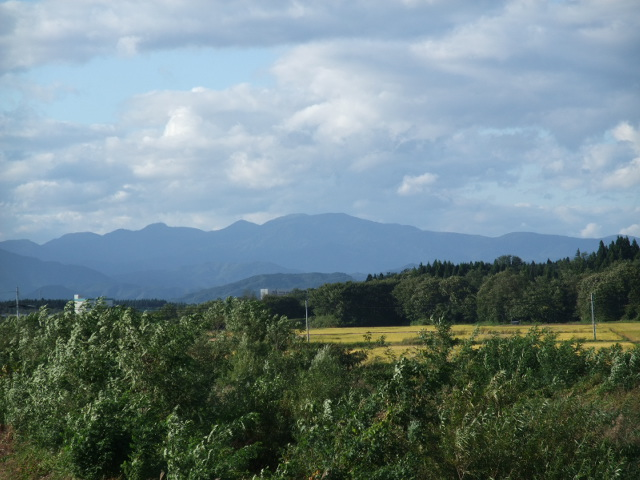 大館市比内町より見た田代岳